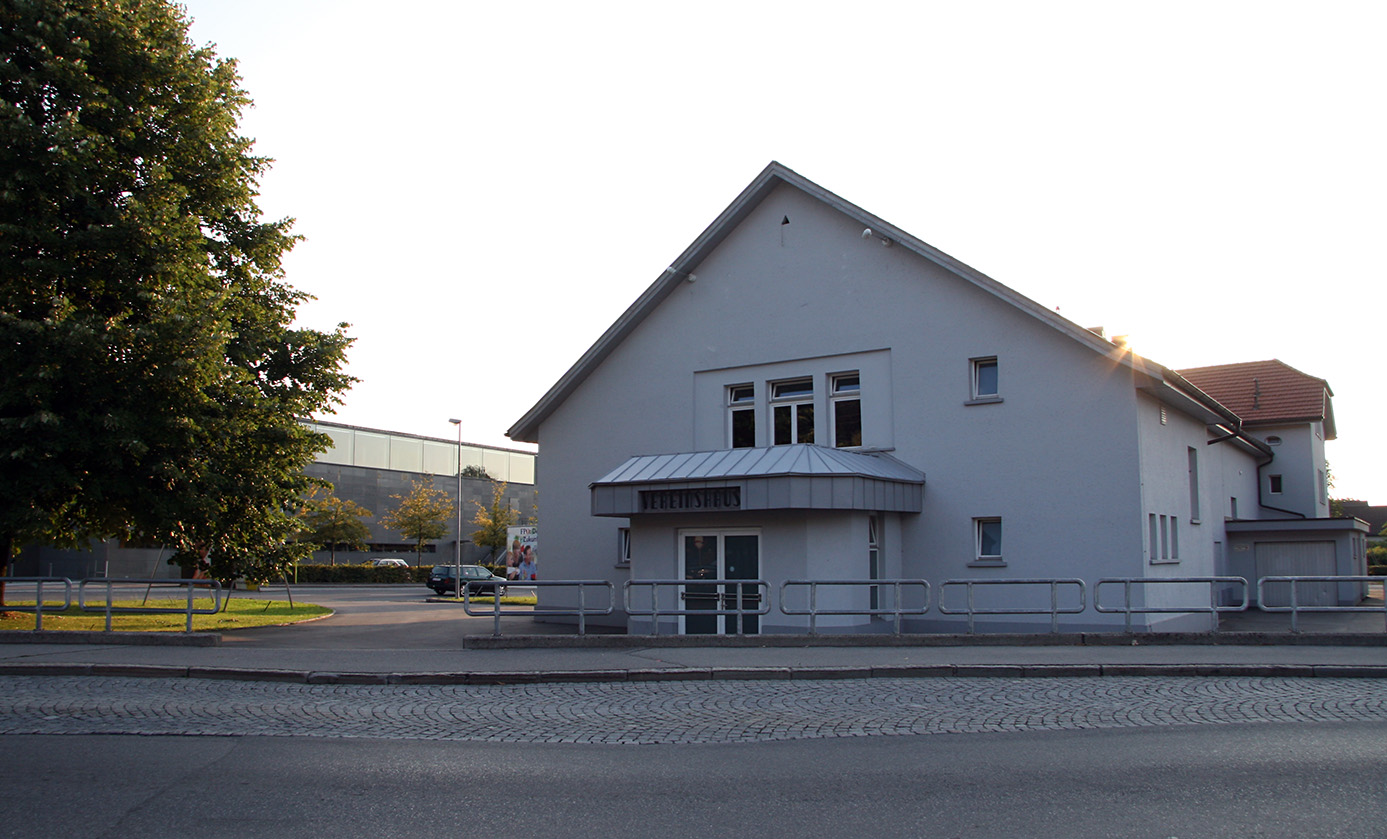 Vereinshaus Wolfurt (Veranstaltungssaal), ein Teil wurde 1913 erbaut, 1922 wurde das Haus fertiggestellt.